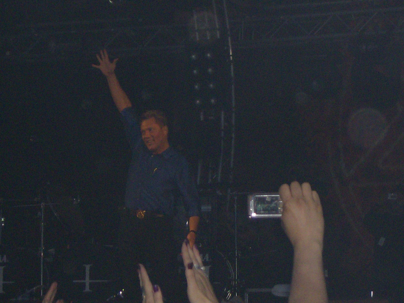 Vesa Keskinen at Miljoonarock 07